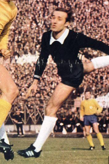 Torino (Italia), stadio Comunale, 28 febbraio 1968. Il portiere sassone Horst Wolter proteso in volo nella sfida tra Juventus ed Eintracht Braunschweig (1-0) valevole per il ritorno dei quarti di finale della Coppa dei Campioni 1967-68.